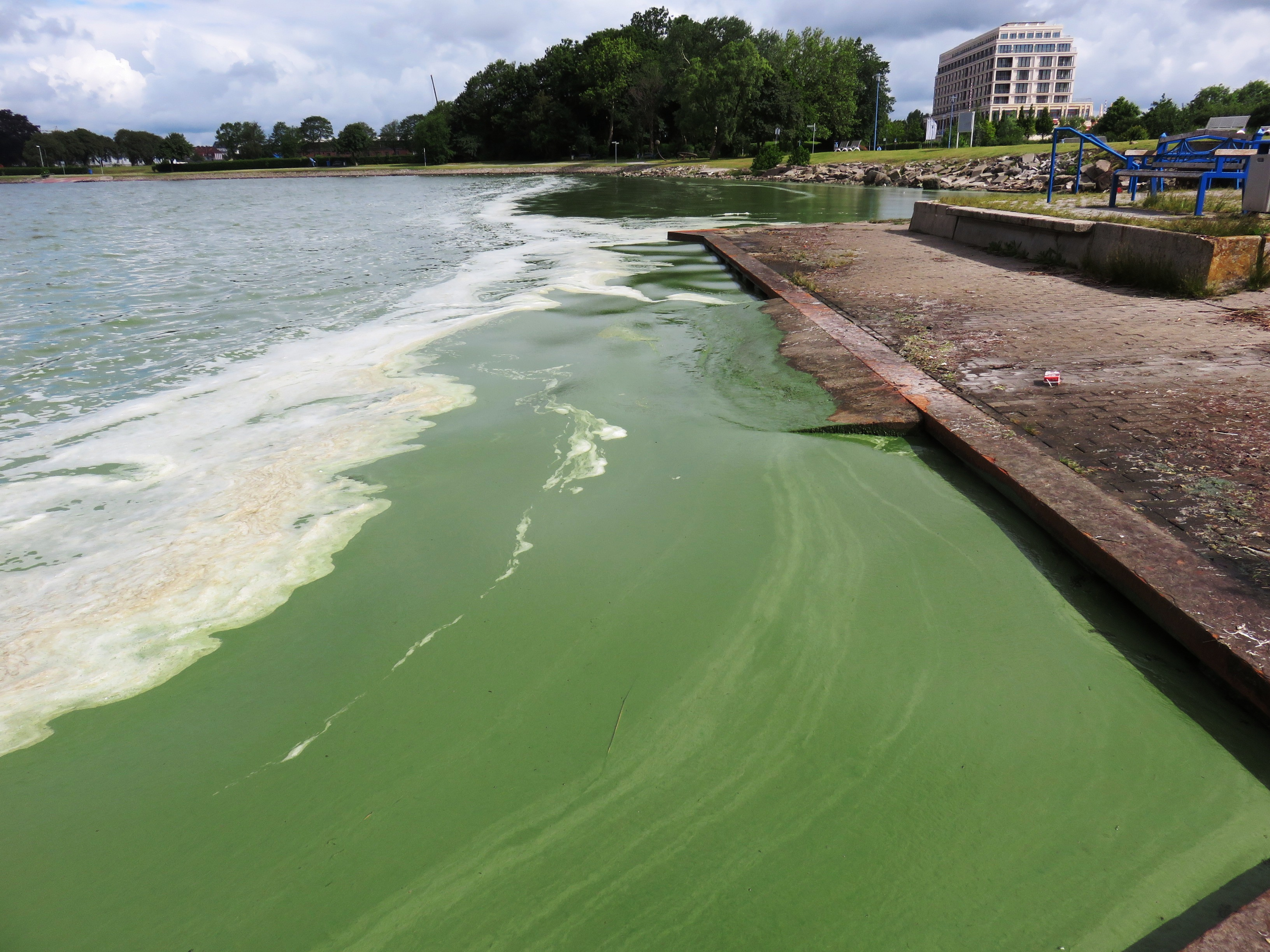 Cyanobakterien (umgangssprachlich Blaualgen) im Banter See. Durch Winddrift wurde die schmierige Masse am Grodendamm konzentriert.